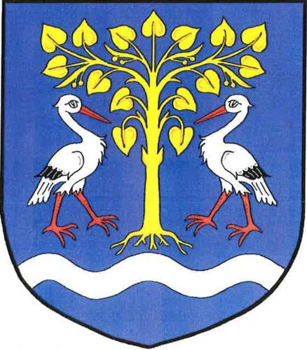 Lípa nad Orlicí znak